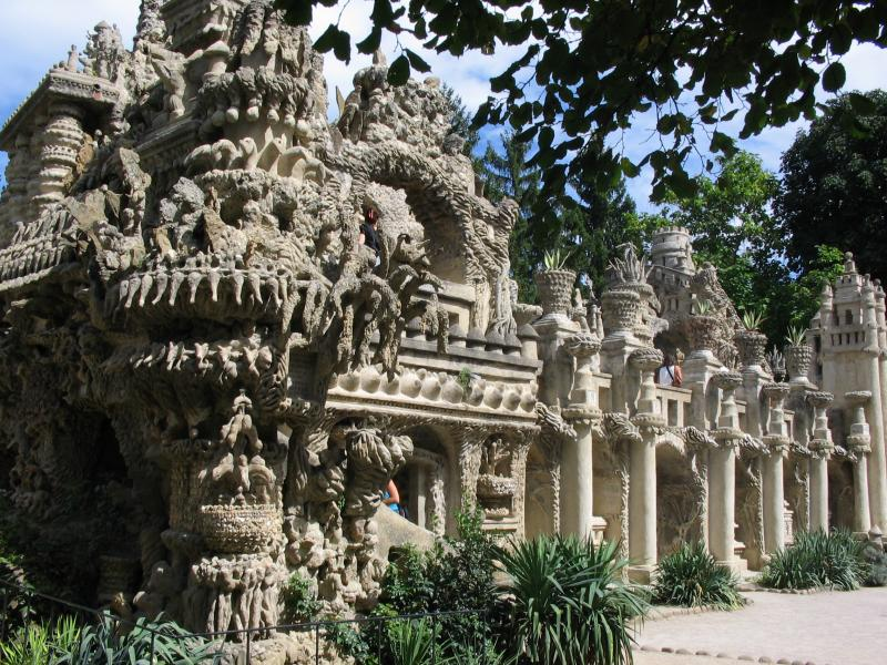 Palais Ideal du Facteur Cheval